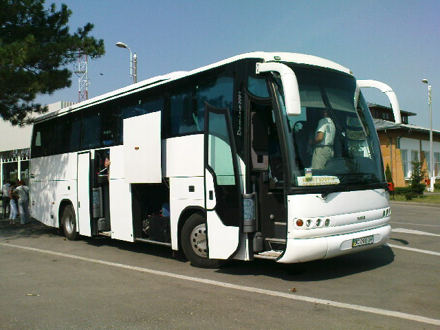 з відкритими відсіками і повернутим колесом